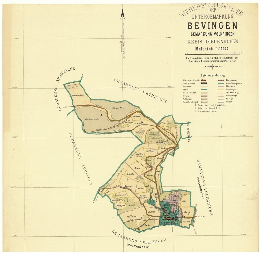 Uebersichtskarte der Untergemarkung Bevingen, Gemarkung Volkringen, Kreis Diedenhofen.